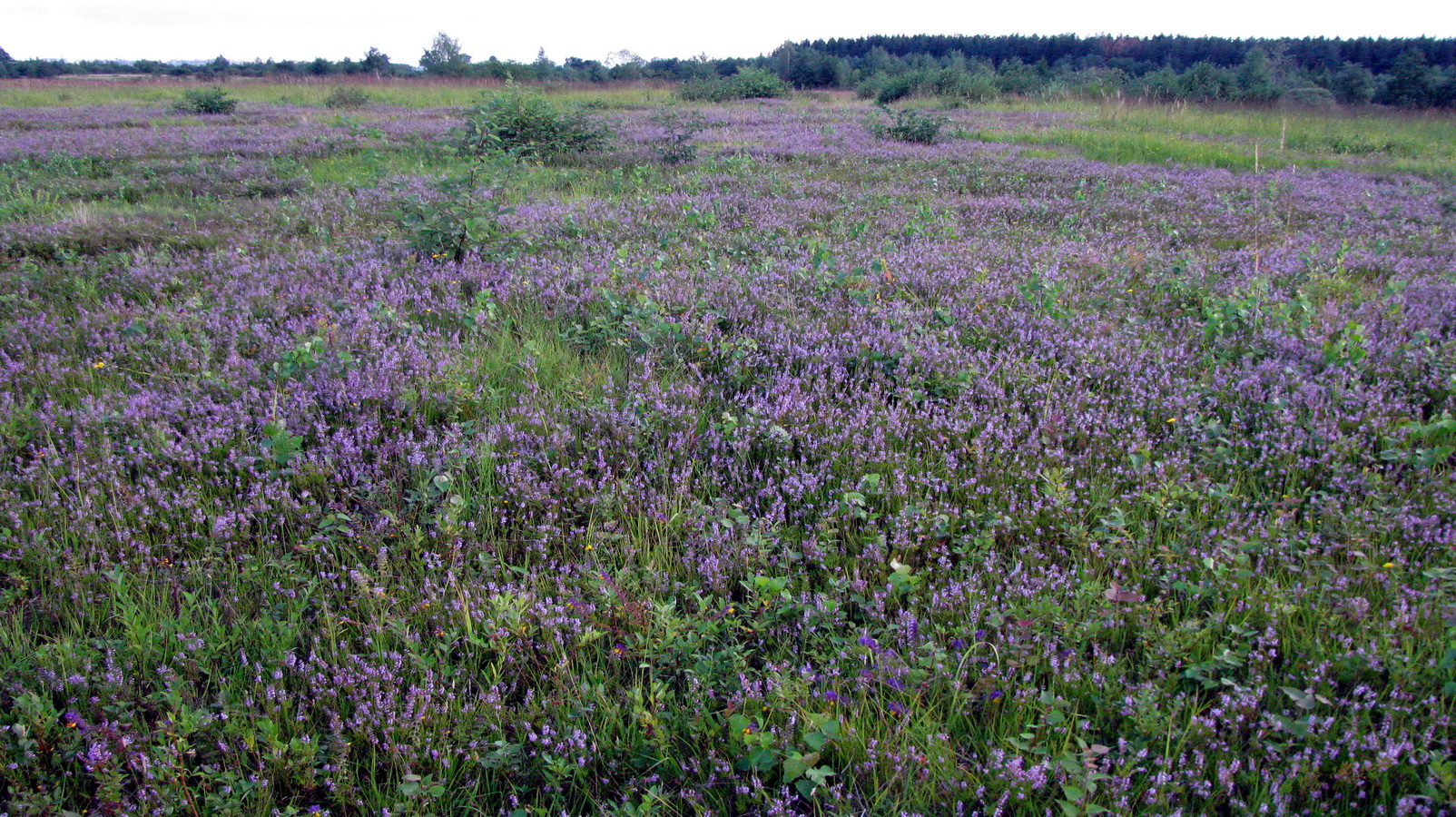 Вересковое поле. Heather field.